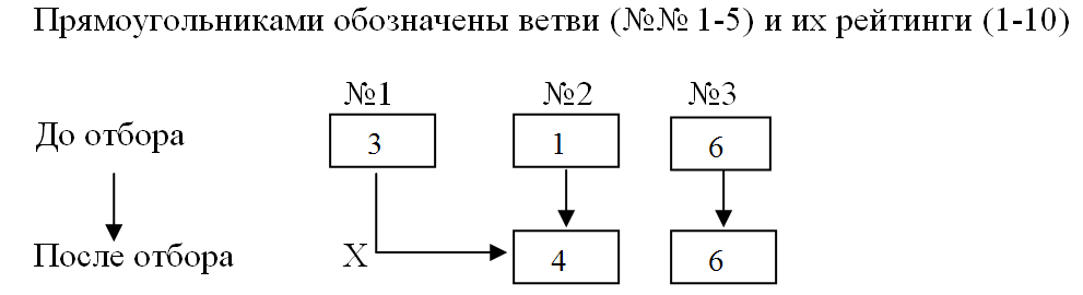 Отбор при игре в Деловые шахматы